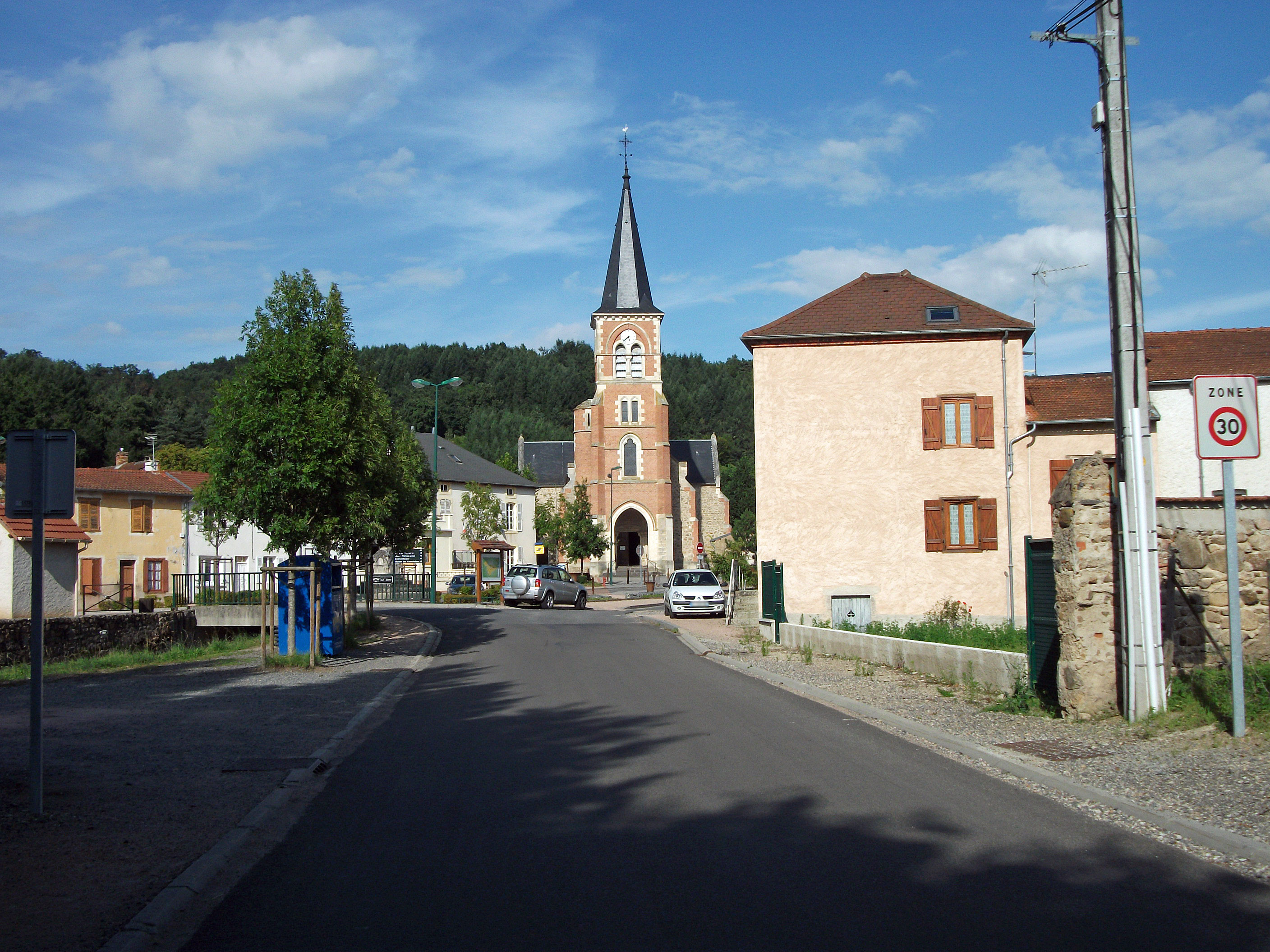 Entrée de Mariol par le sud, D 260, entrée de zone 30 avec église